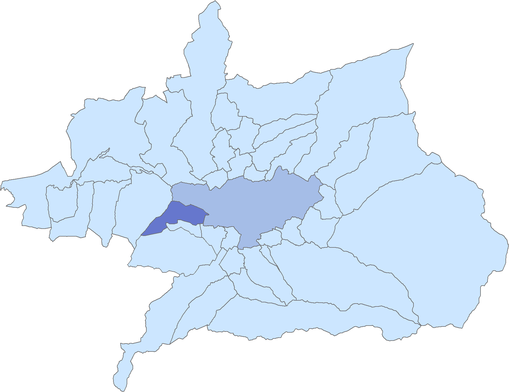 Situación del municipio de Vegas del Genil respecto a la comarca de la Vega de Granada, en España.